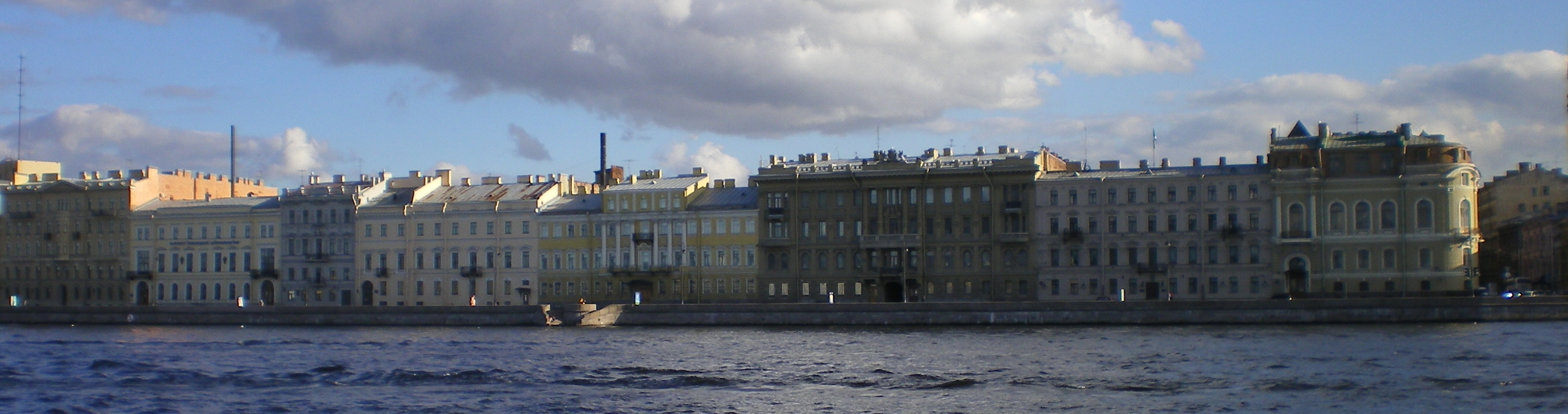 Набережная Кутузова дома 10-22, вид с Невы. Гагаринская улица, спуск к Неве у дома № 16